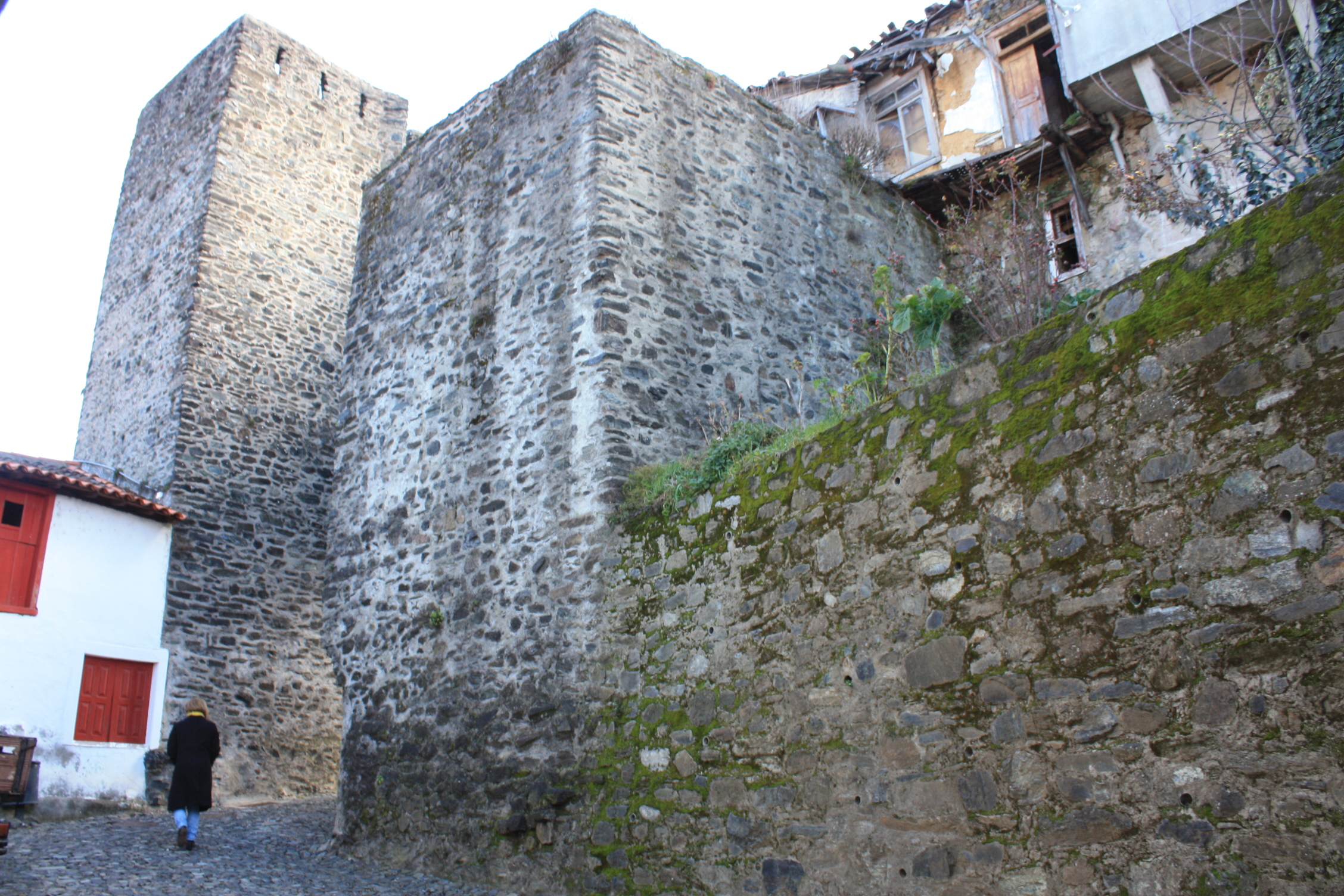 Castelo de Vinhais - Cultural property Castle of Vinhais, Vinhais, Bragança District, Portugal Q5049847, SIPA ID: 2121, DGPC ID: 70570 Wiki Loves Monuments ID: DGPC-70570